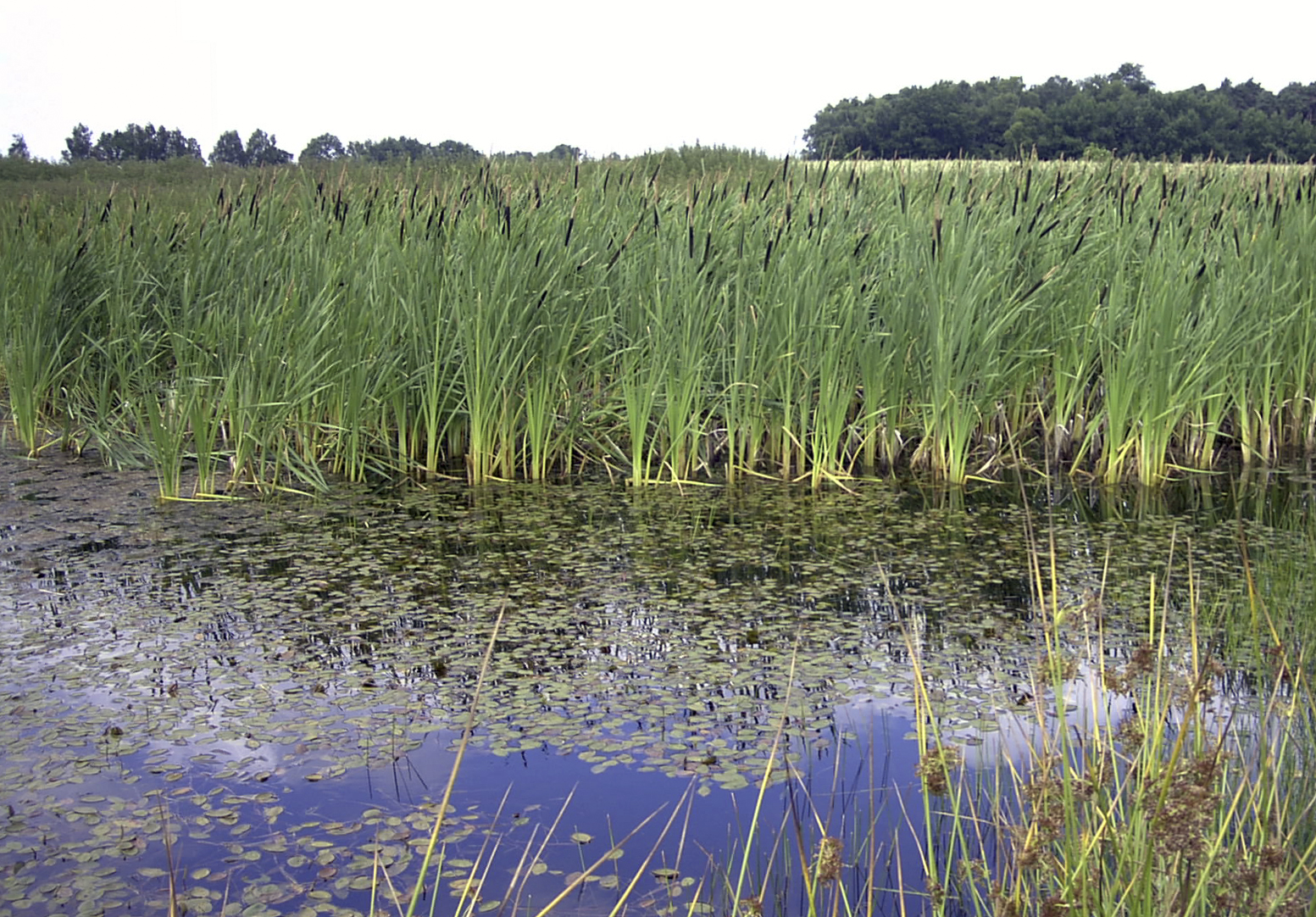 Typha latifolia, Wildeshauser Geest, Syke/Bassum